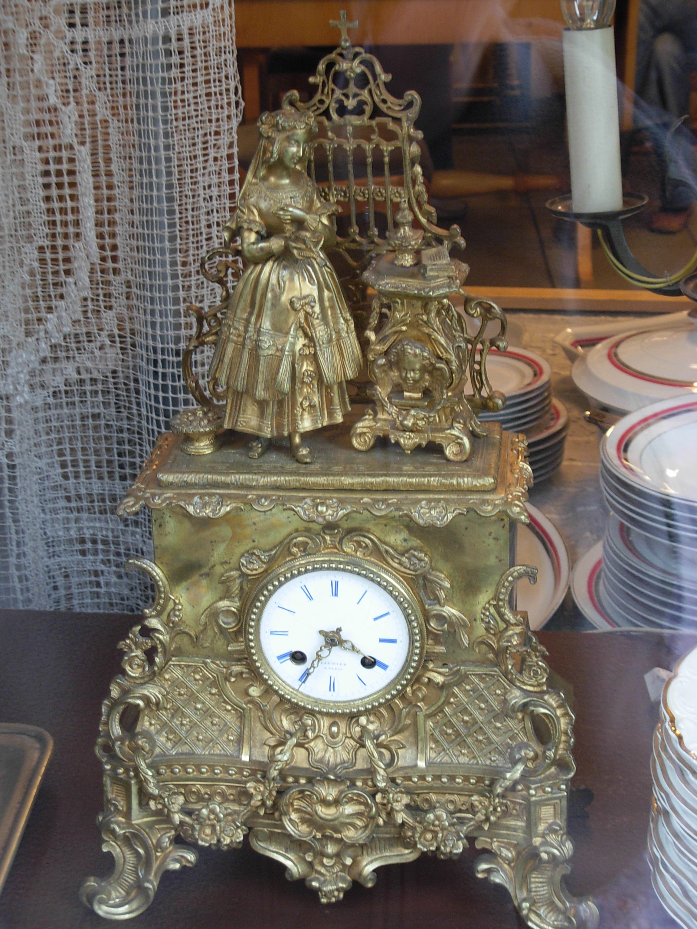 Katowice